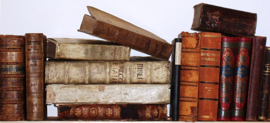 Diverse Bücher (Bücherhaufen) aus dem 16., 17. und 18. Jahrhundert, aus meinem Besitz (User:Gnosos), selbst fotografiert